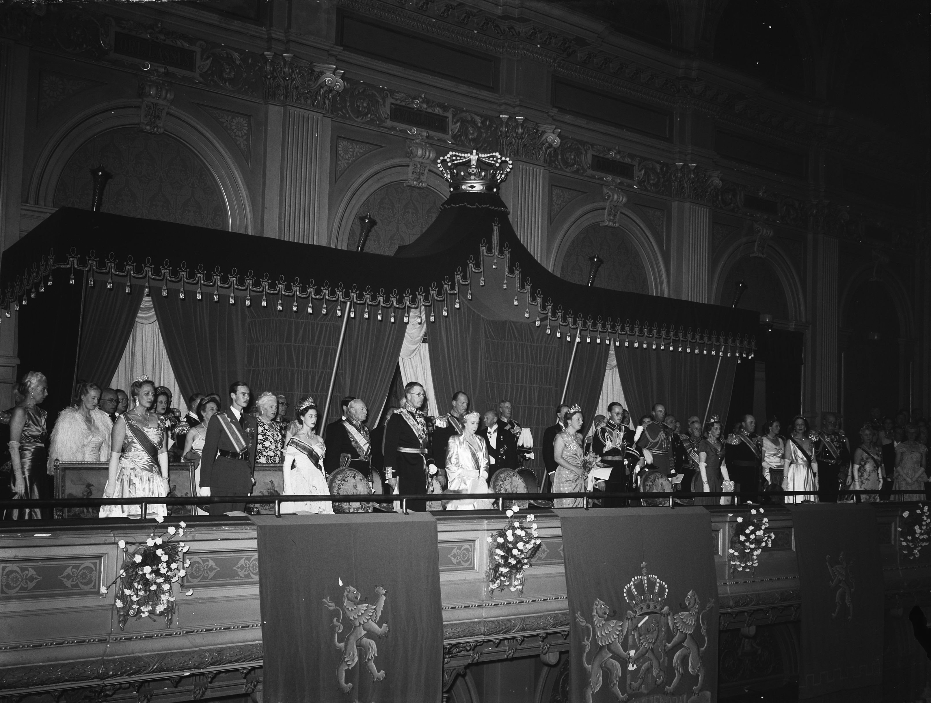 Collectie / Archief : Fotocollectie Anefo Reportage / Serie : Troonsafstand koningin Wilhelmina / Inhuldiging van koningin Juliana Beschrijving : Inhuldiging koningin Juliana. Officieel slot van de feestweek. Gala-concert in het Concertgebouw te Amsterdam, met het Concertgebouworkest, onder leiding van Eduard van Beinum. Overzicht ere-loge met de buitenlandse vorstelijke gasten. V.l.n.r. kroonprinses Märtha (Noorwegen), erfgroothertog Jean (Luxemburg), prinses Margaret (Engeland), kroonprins Gustaf Adolf (Zweden), koningin-moeder Elisabeth (België), het koninklijk paar, kroonprinses Louise (Zweden) en kroonprins Olav (Noorwegen) Datum : 7 september 1948 Locatie : Amsterdam, Noord-Holland Trefwoorden : concerten, inhuldigingen, koninklijk huis, muziek Persoonsnaam : Bernhard, prins, Elisabeth, koningin van Groot-Brittannië, Gustaf Adolf prins, Juliana, koningin, Louise prinses, Luxemburg, Jean van, Margaret, prinses van Groot-Brittannië, Martha prinses, Olav, prins van Noorwegen Instellingsnaam : Concertgebouw Fotograaf : Fotograaf Onbekend / Anefo Auteursrechthebbende : Nationaal Archief Materiaalsoort : Glasnegatief Nummer archiefinventaris : bekijk toegang 2.24.01.09 Bestanddeelnummer : 900-0244